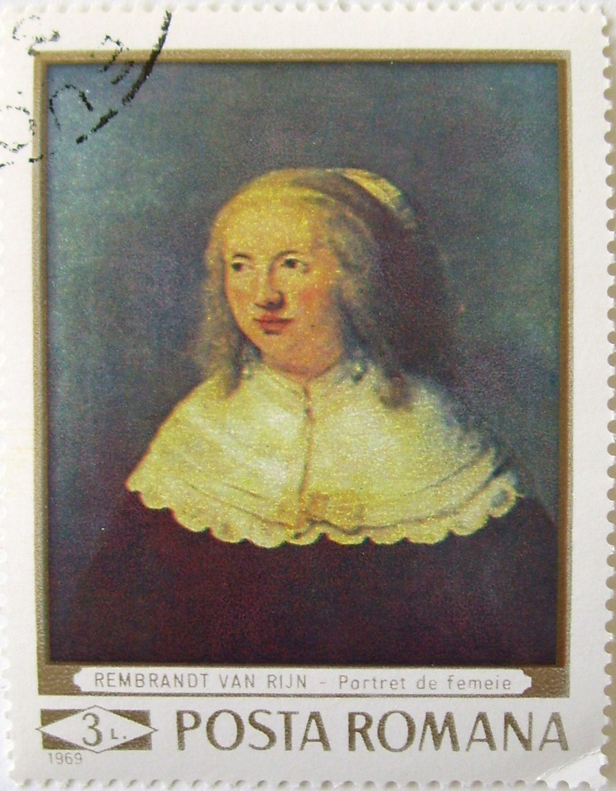 Source: Post of Romania